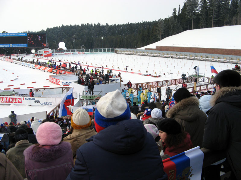 Центр лыжного спорта в Ханты-Мансийске во время соревнований по биатлону